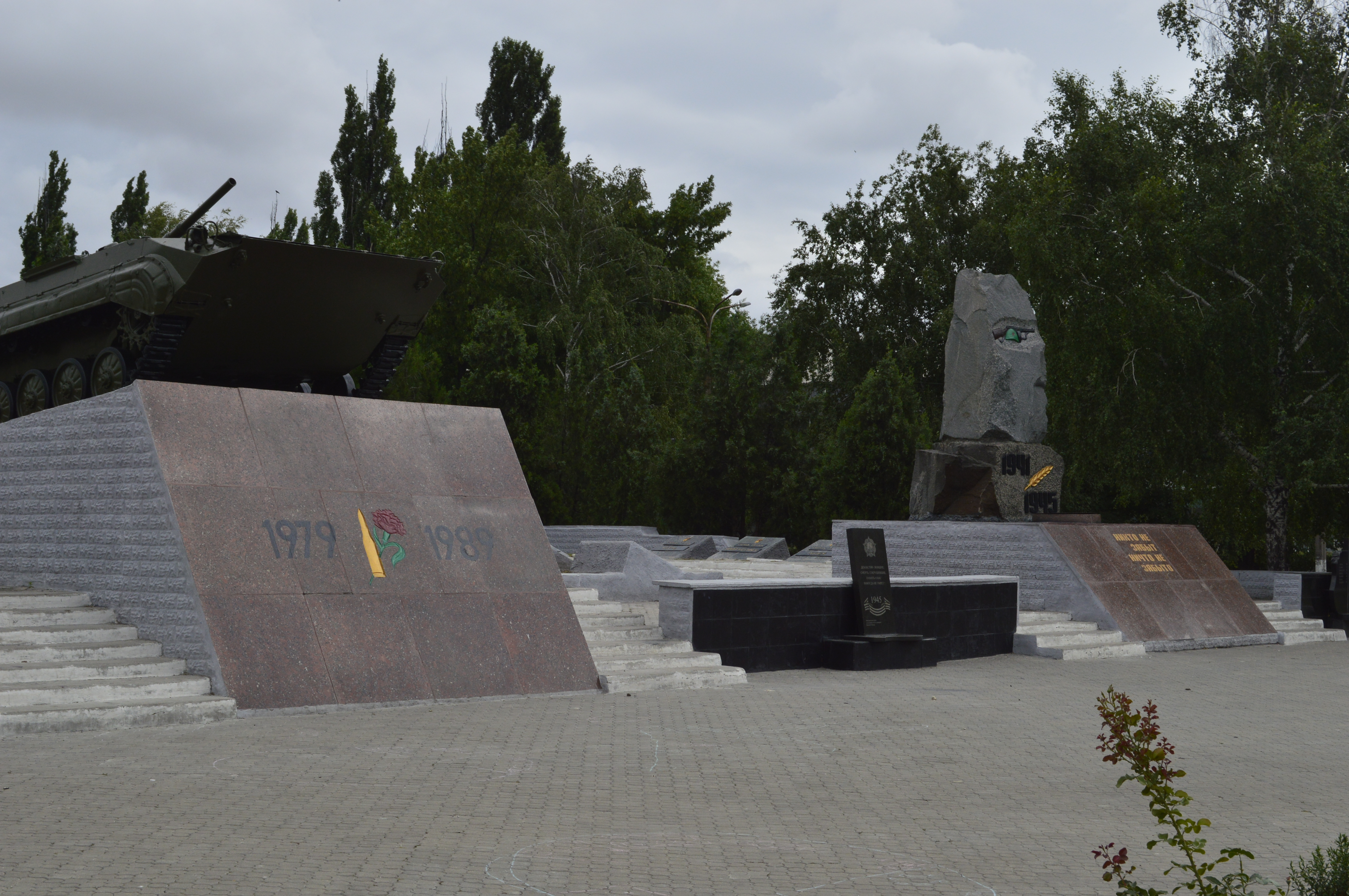 Мемориальный комплекс в городе Першотравенск посвящённый ветеранам ВОВ, афганцам, чернобыльцам